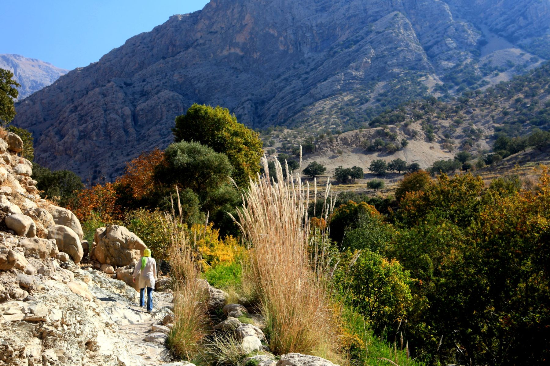 Malagha, Khuzestan, Iran